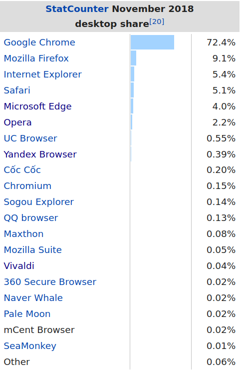 Nabigatzaileen erabilpenari buruzko estatistikak, 2018.